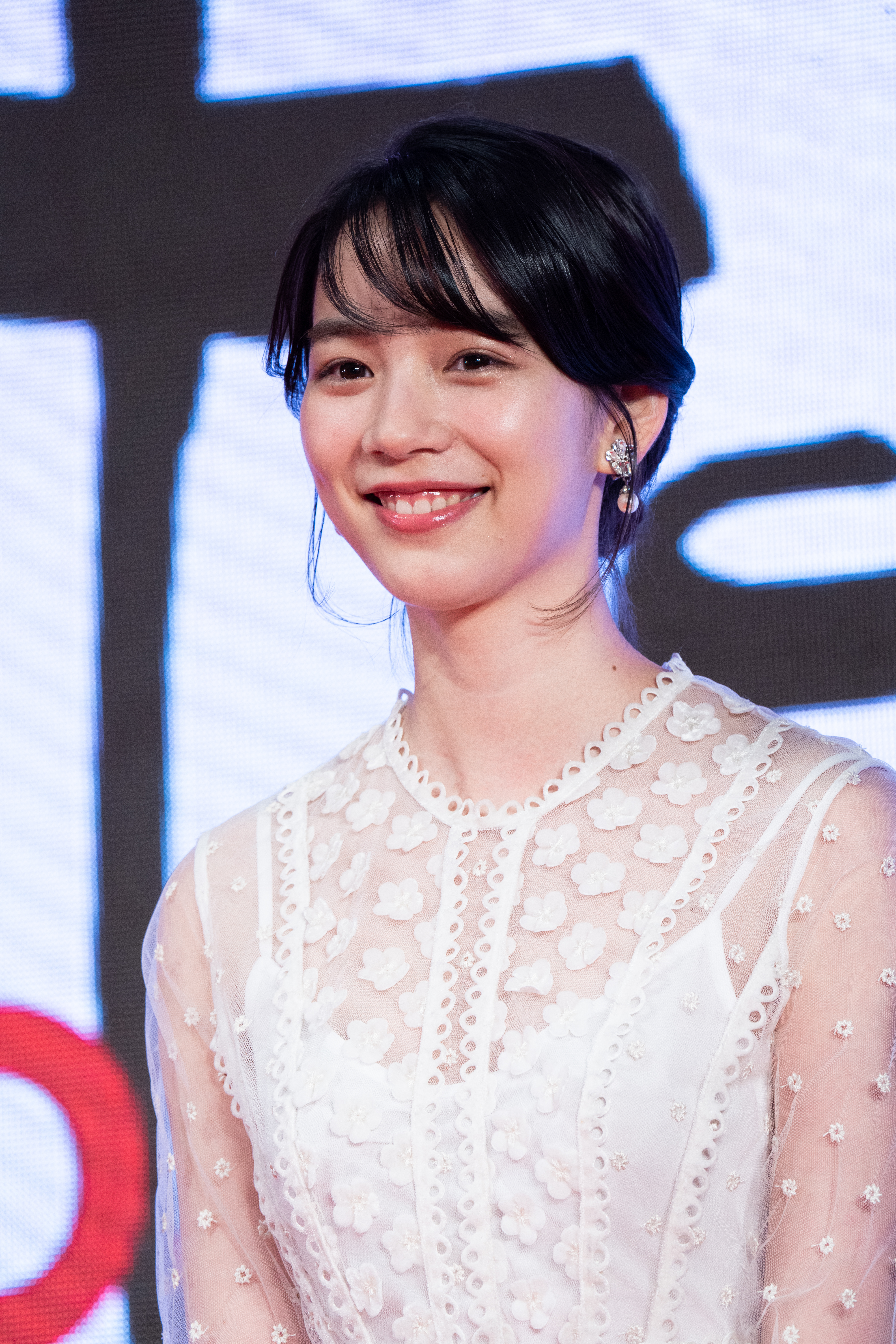 第32回 東京国際映画祭 オープニングセレモニー のん (能年玲奈) (この世界の(さらにいくつもの)片隅に)